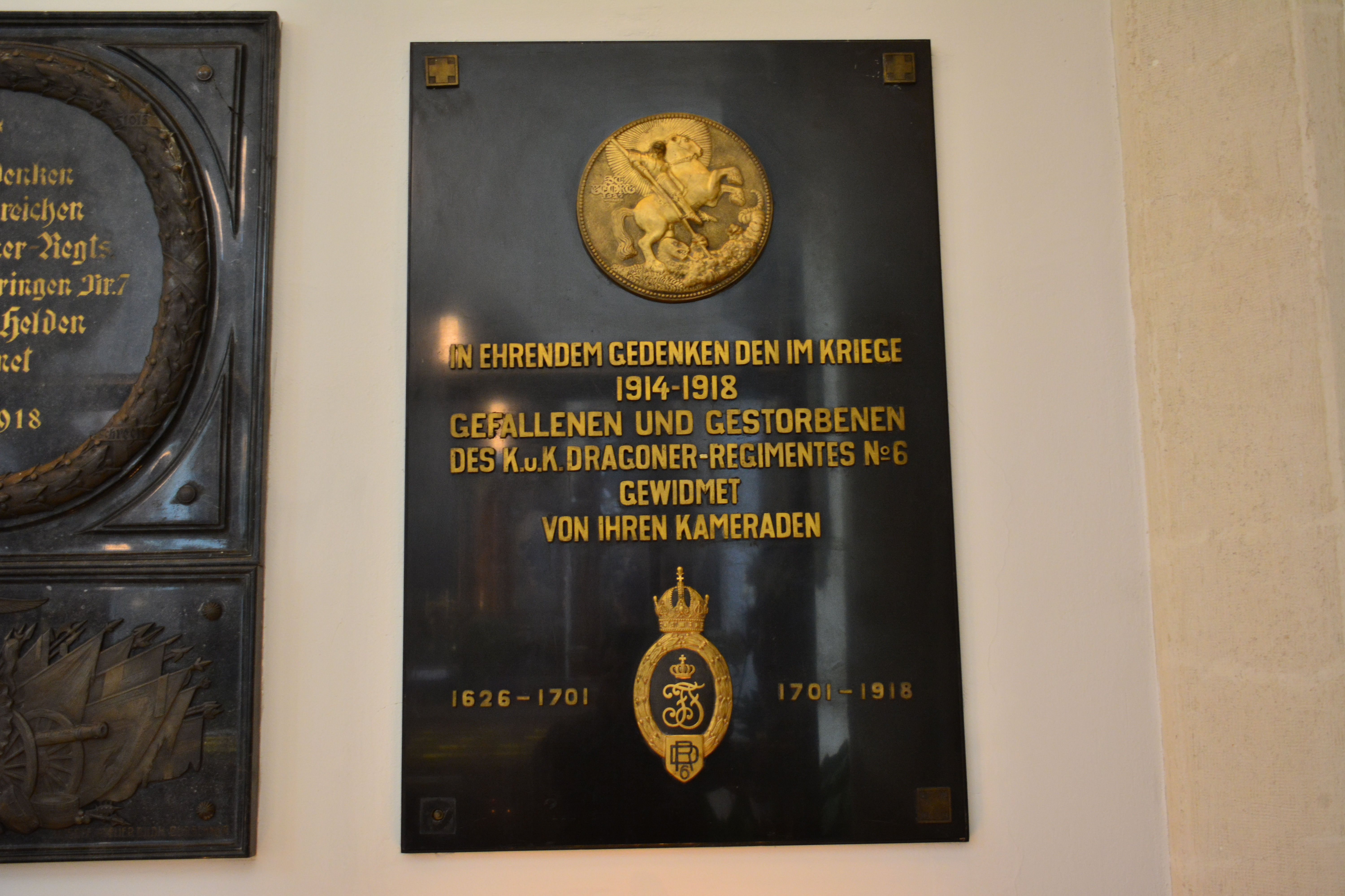 Gedenktafel für das k.u.k. Dragonerregiment Nr. 6 (Wien, Neuer Markt, Kapuzinerkirche)